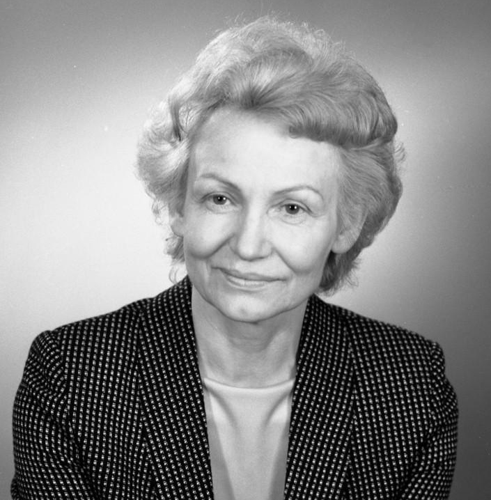 ADN-ZB / Brüggmann / 13.6.86 [Herausgabedatum] / Berlin: Dr. h.c. Margot Honecker, Minister für Volksbildung; Mitglied des ZK der SED; geb. am 17.4.1927; Telefonistin.